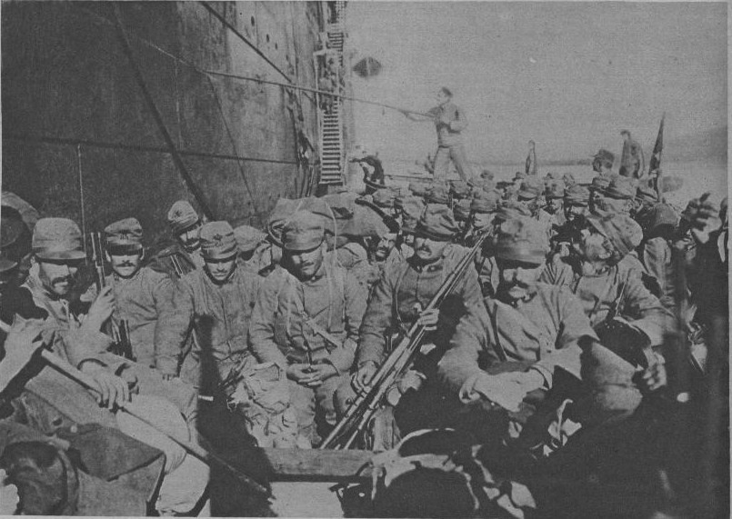 image publiée dans "le miroir".